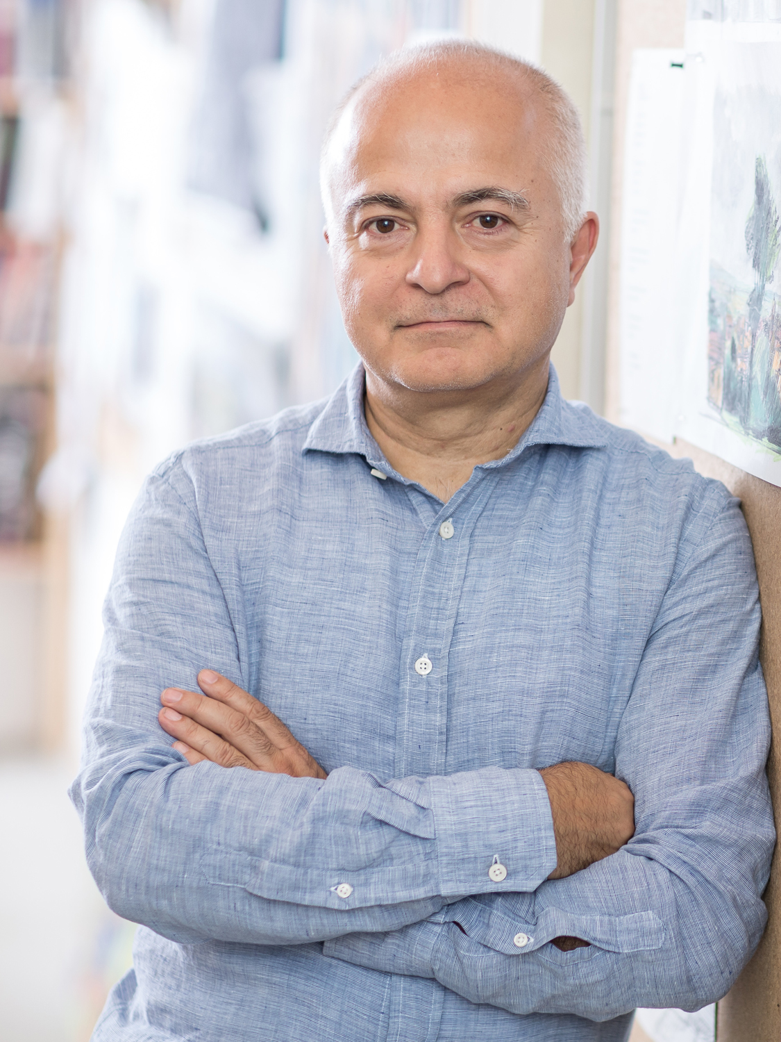 Yadegar Asisi, Foto: Caro Krekow (c) asisi